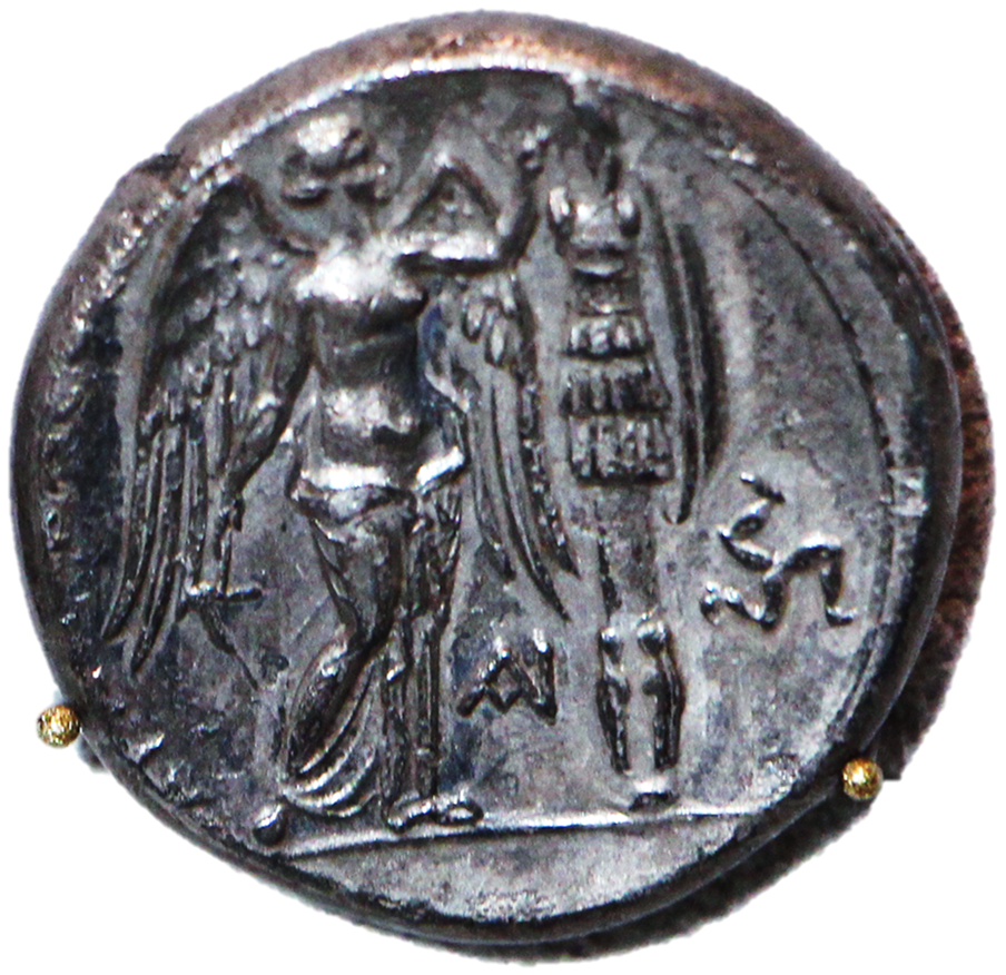 Nike alata, trofeo, Agatocle 305 - 295 a.C. Ritaglio da immagine originale.